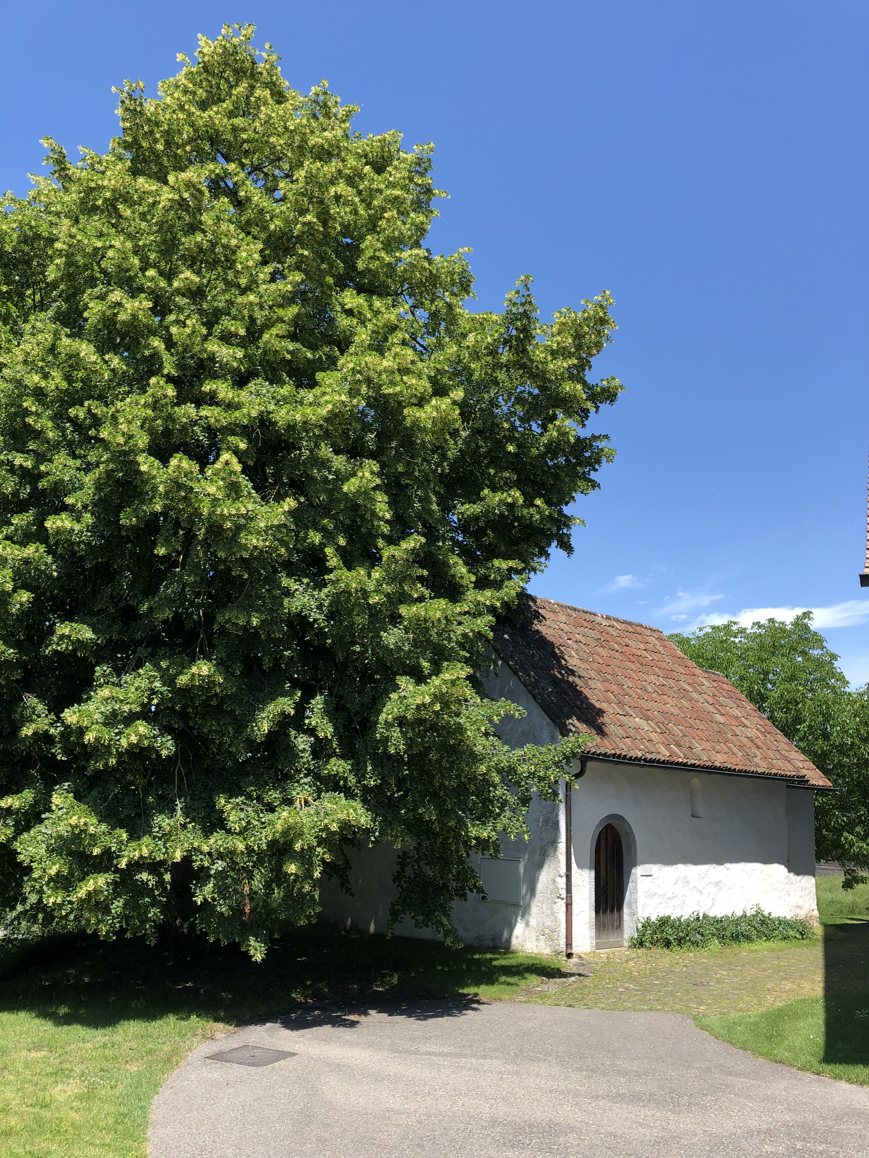 Kapelle Rossberg Ostseite